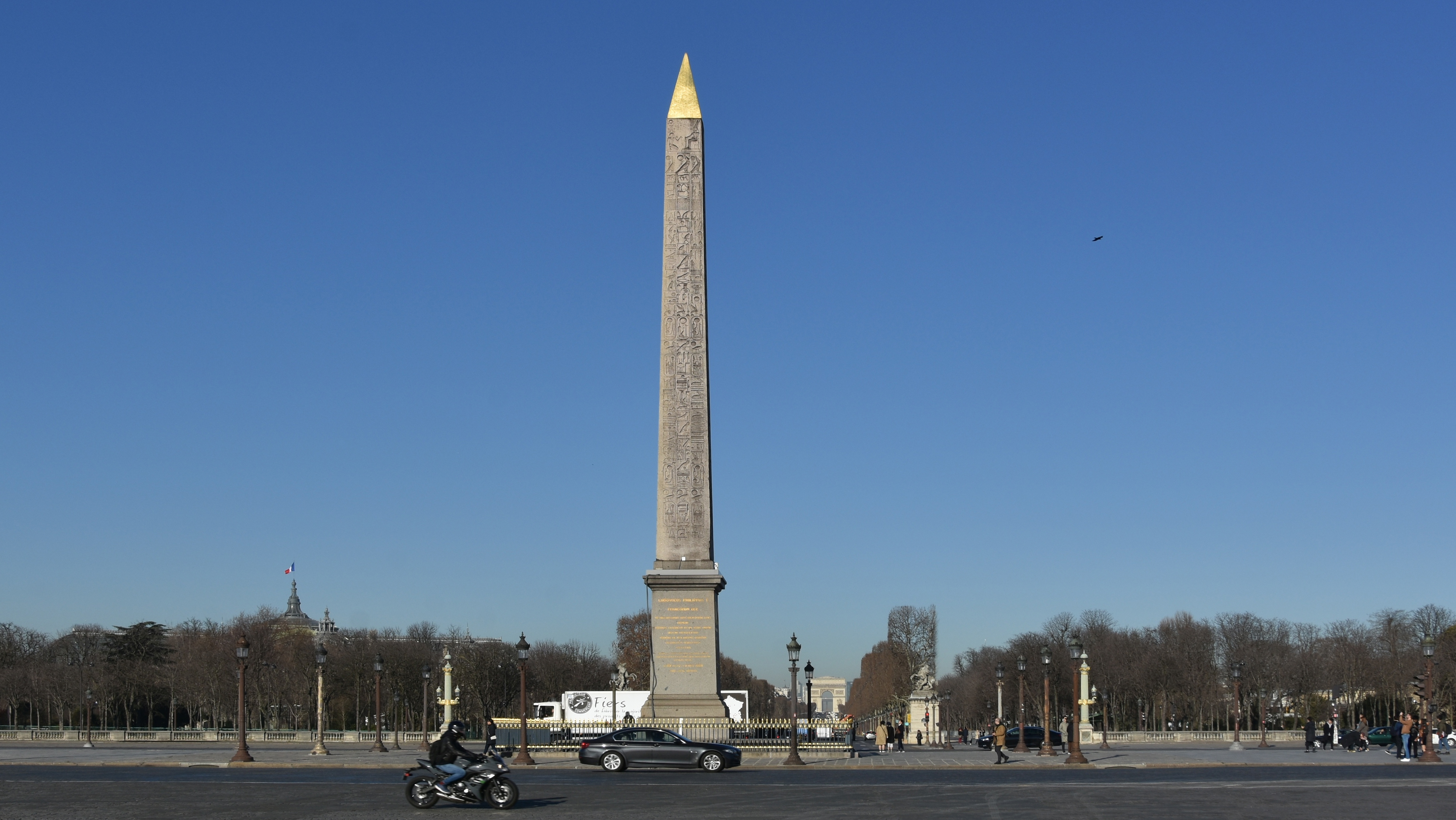 Place de la Concorde Parijs 25-02-2019 10-07-11